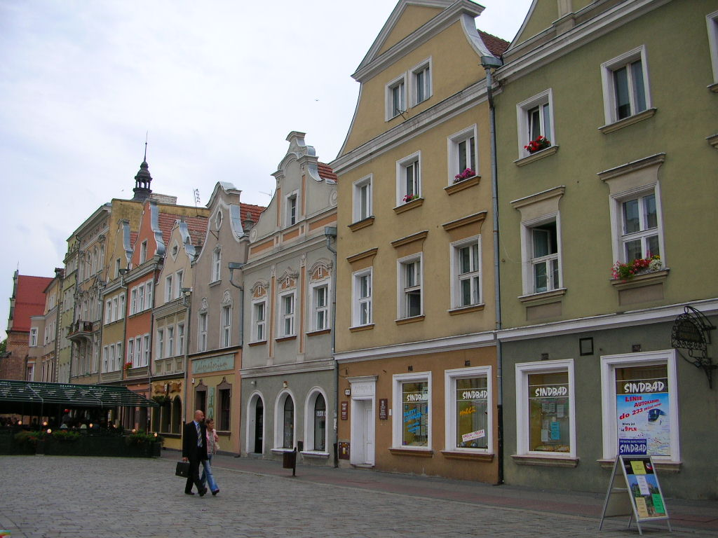 Opole - Rynek Autor - Bartek Wawraszko ( Bast )